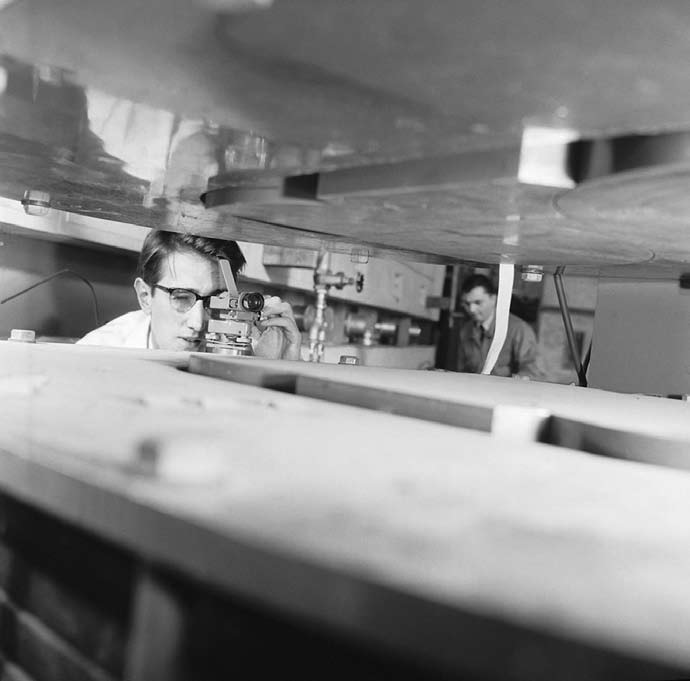 Foto met Johannes (Hans) C. Sens (1928-2008). Foto afkomstig uit Levensberichten en herdenkingen 2010 van de Koninklijke Nederlandse Akademie van Wetenschappen (Amsterdam, 2010).